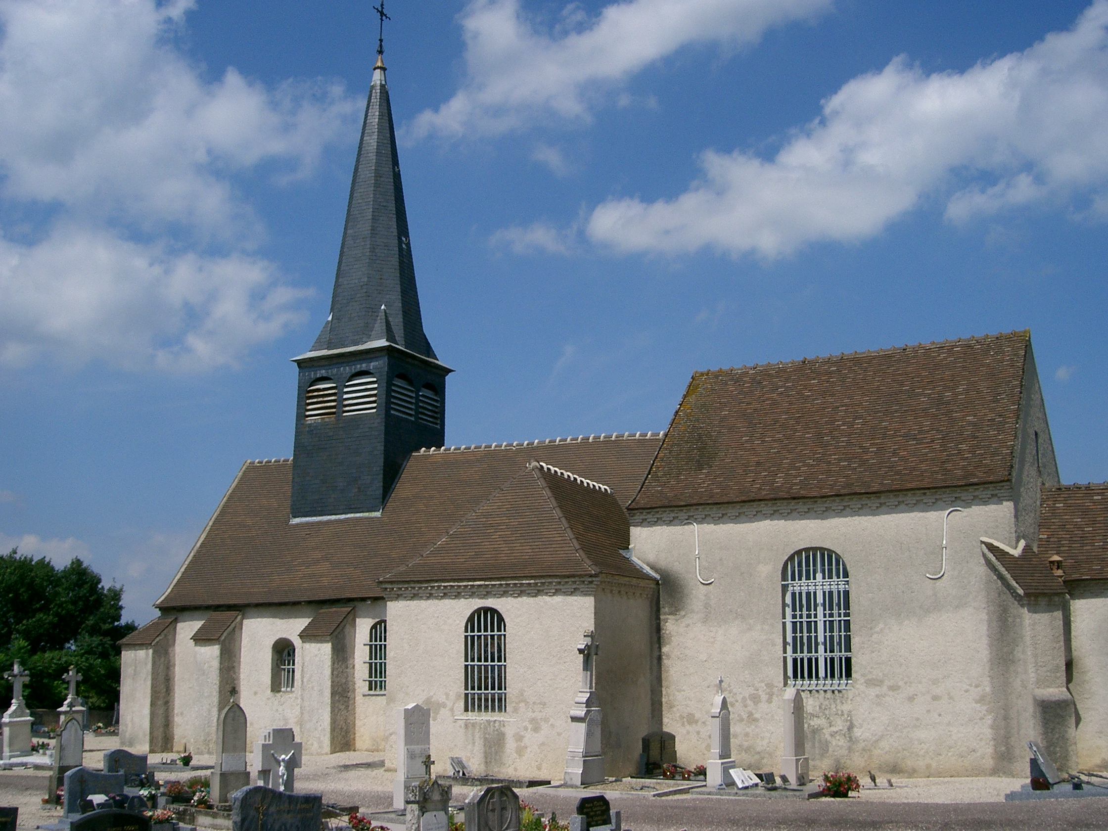 Saunières (Saône et Loire - France) - église